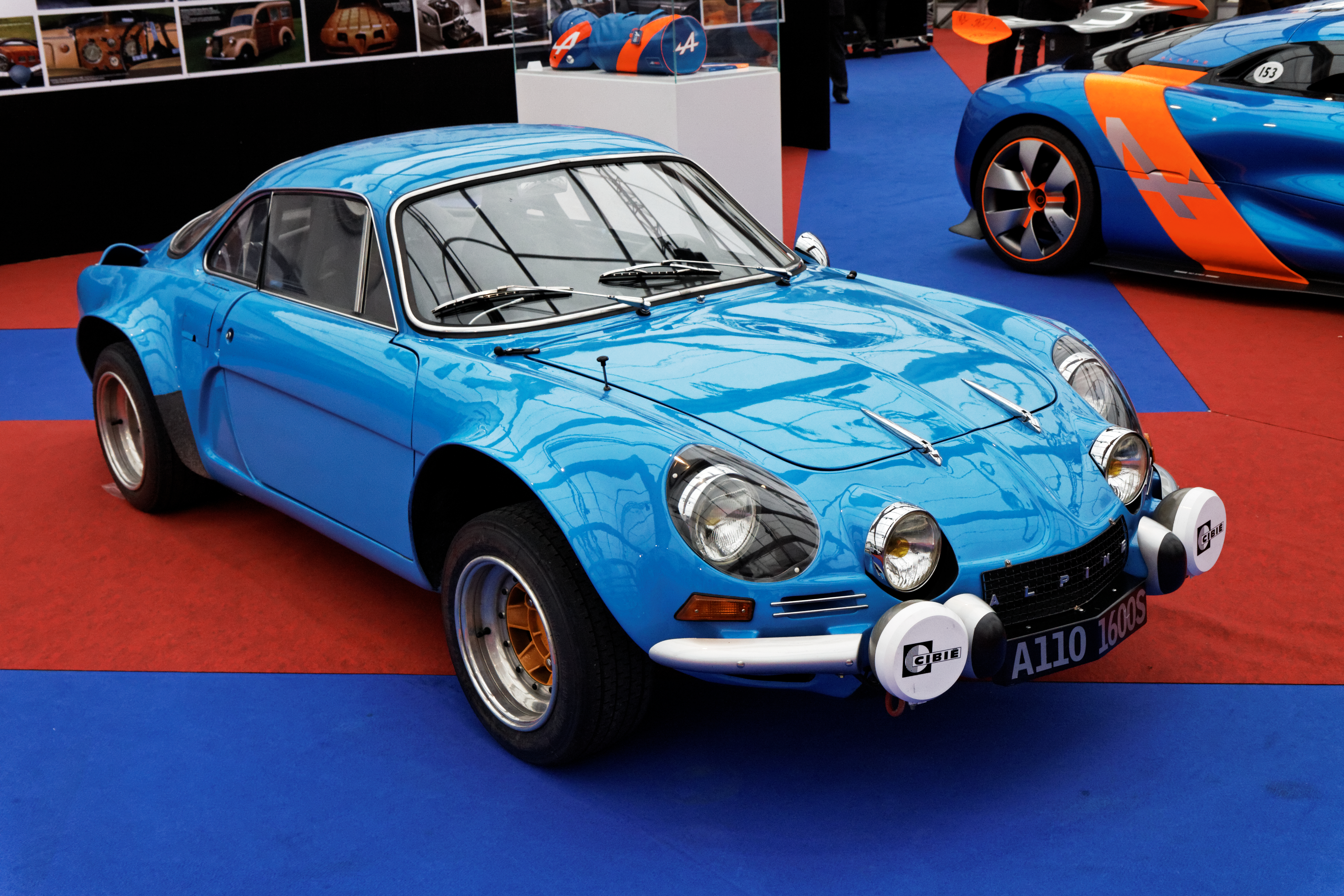 Une Alpine A110 1600S exposée lors du festival automobile international 2013.